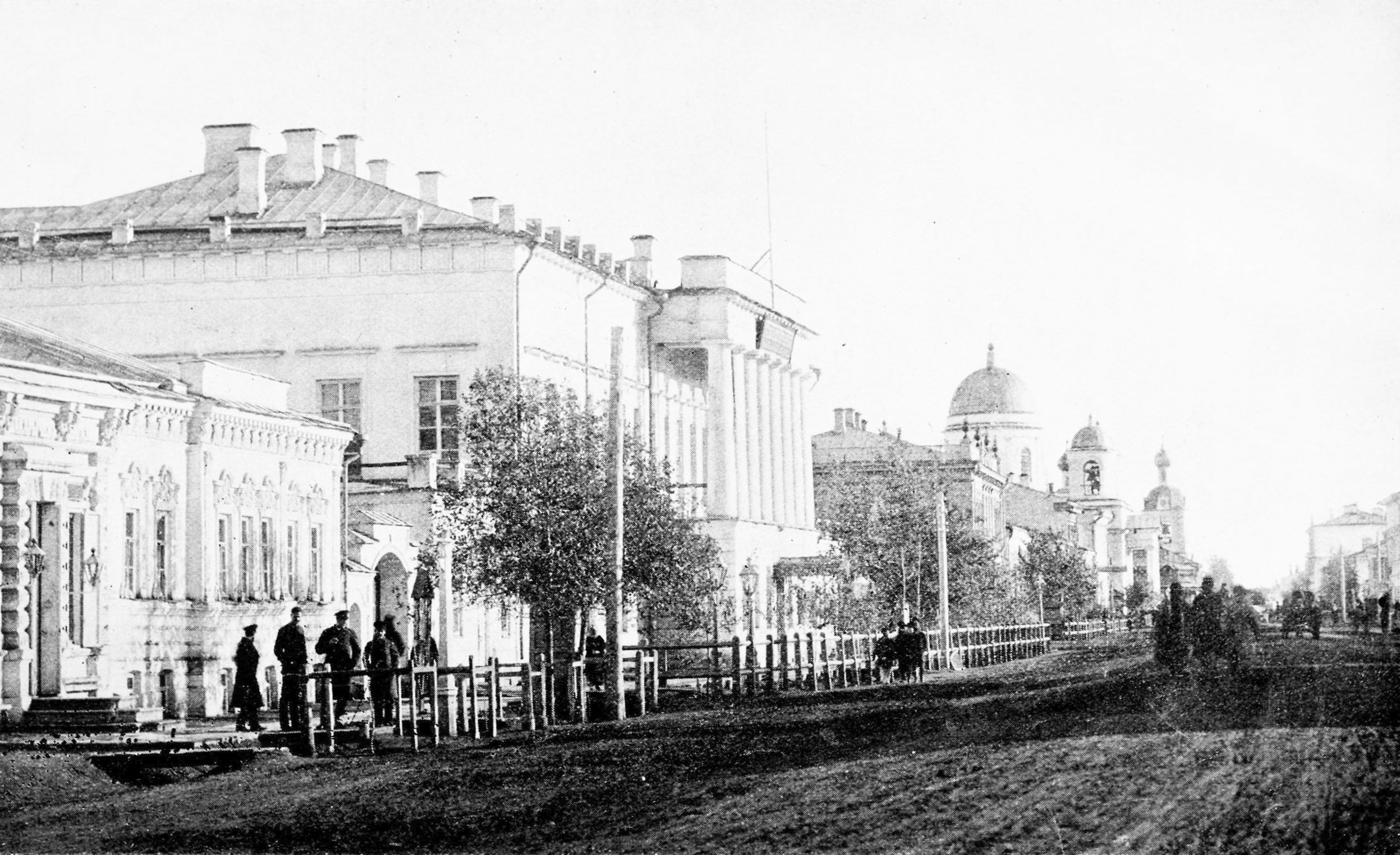 Street in Uralsk